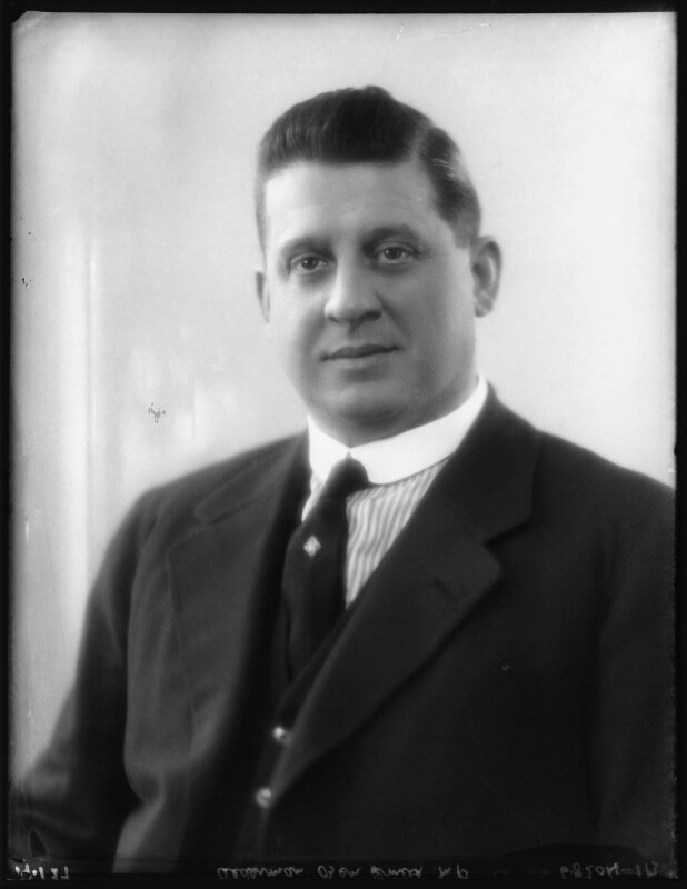 Sir Ben Smith